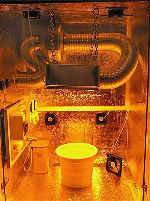 из мебели